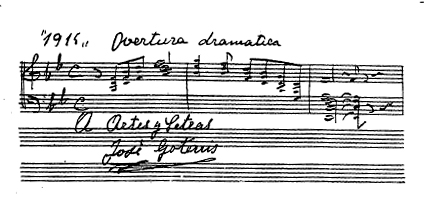 Dedicatoria de José Goterris a la revista Arte y letras con los primeros compases de su obertura "Europa 1915"